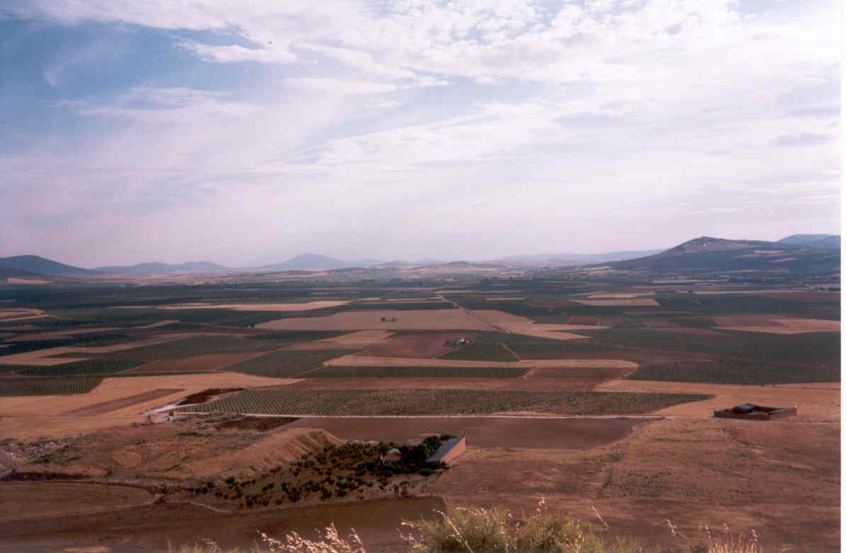 Panoramica de la Mancha de Toledo (Consuegra)